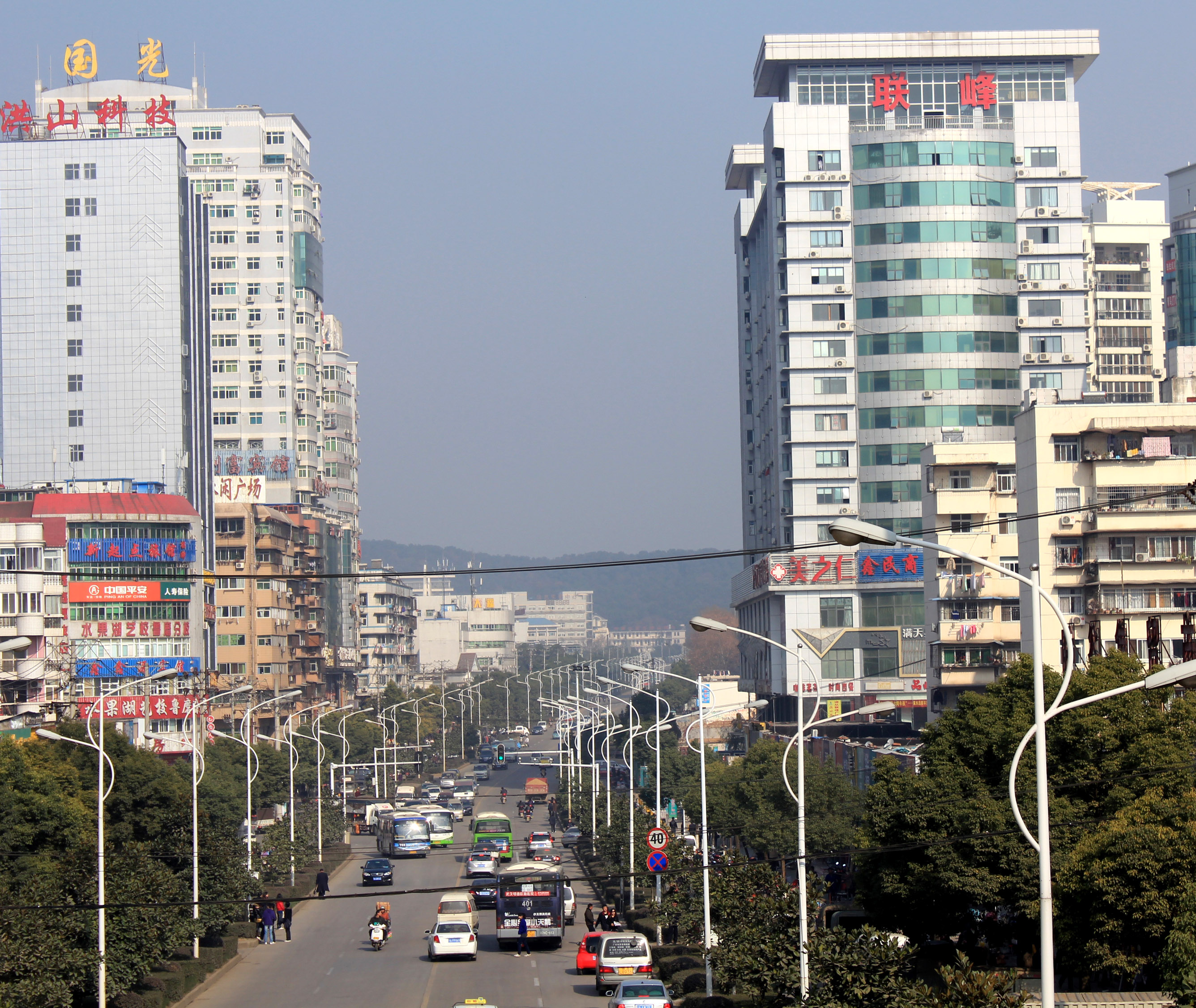 湖北省武汉市洪山区鲁磨路，摄于光谷广场路口的过街天桥上。